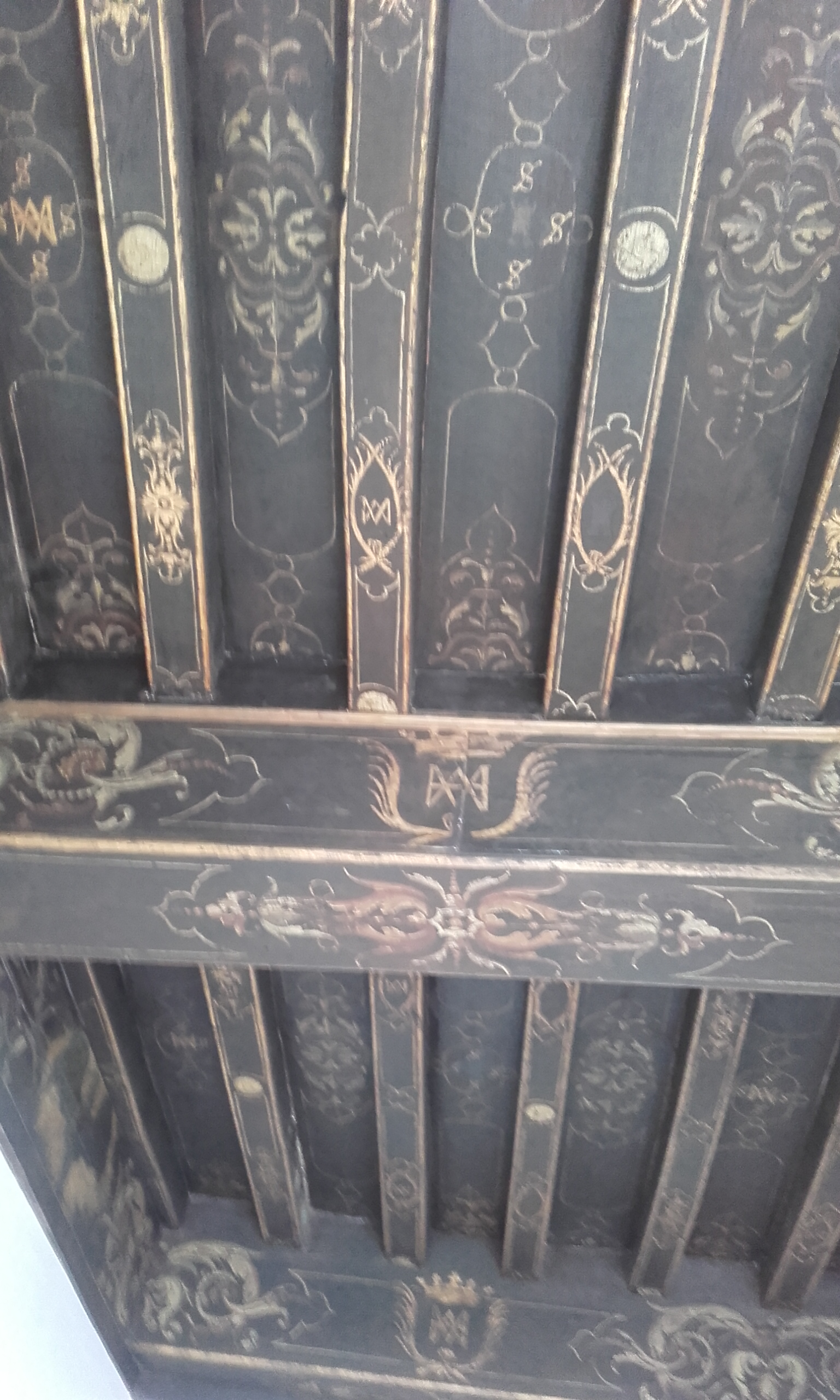 Plafond à poutres apparentes décorées de peintures situé (premier étage du pavillon de droite). Classé par arrêté du 12 septembre 1921